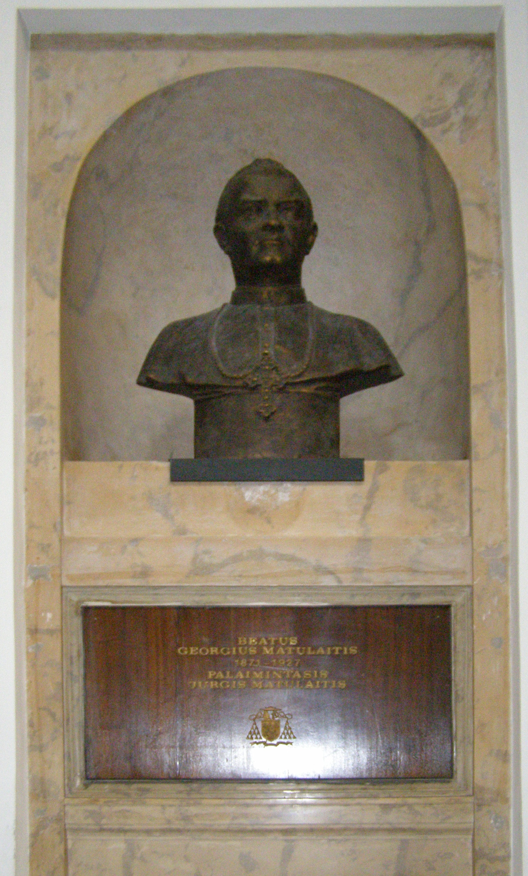 Popiersie Jerzego Matulewicza w katedrze wileńskiej w miejscu zniszcoznego popiersia i nagrobka biskupa Jana Cieślaka